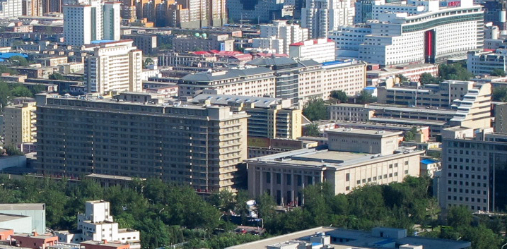 北京京西賓館